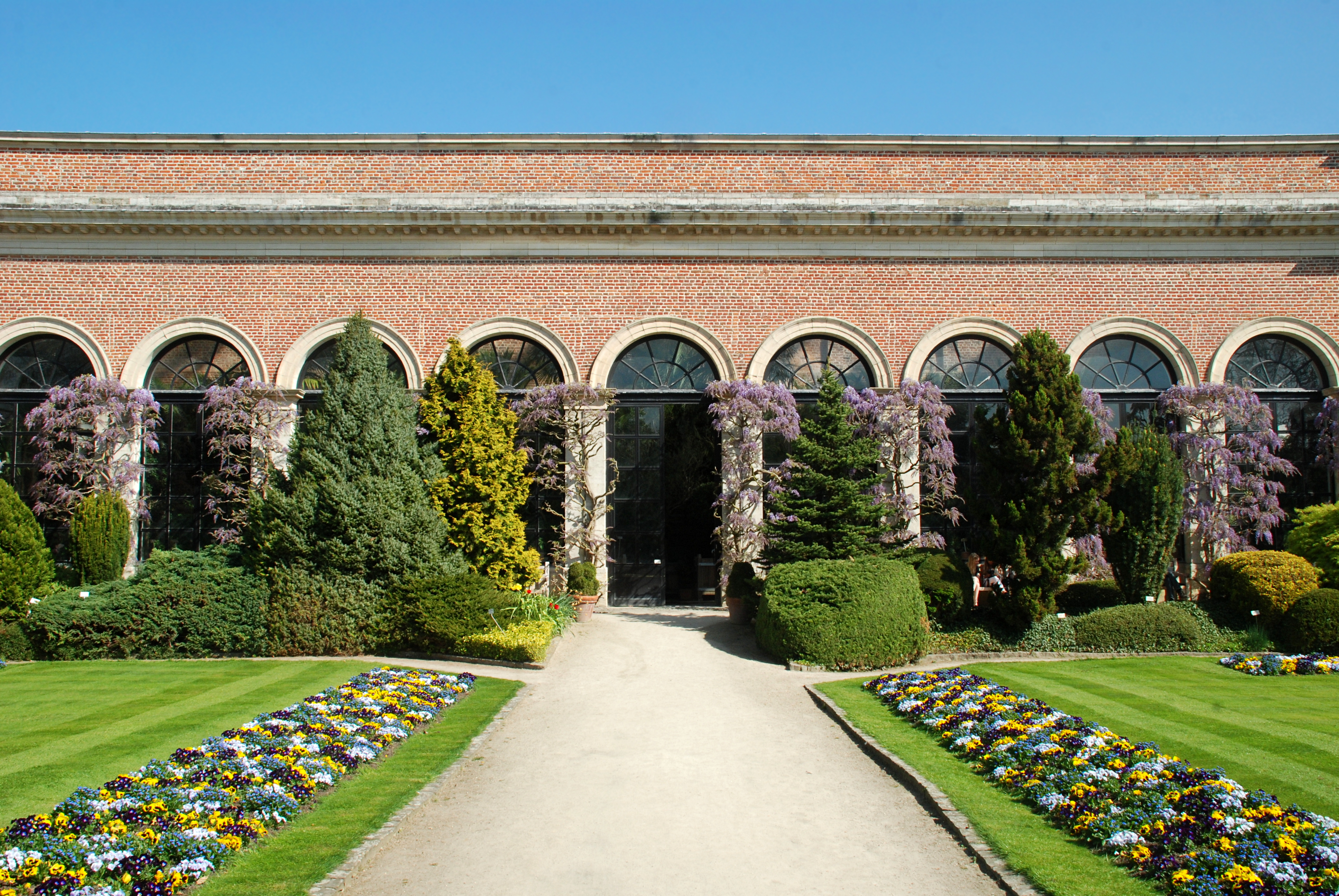 Belgique - Louvain - Jardin botanique (Kruidtuin) - orangerie néo-classique (architecte Charles Vander Straeten - 1821)